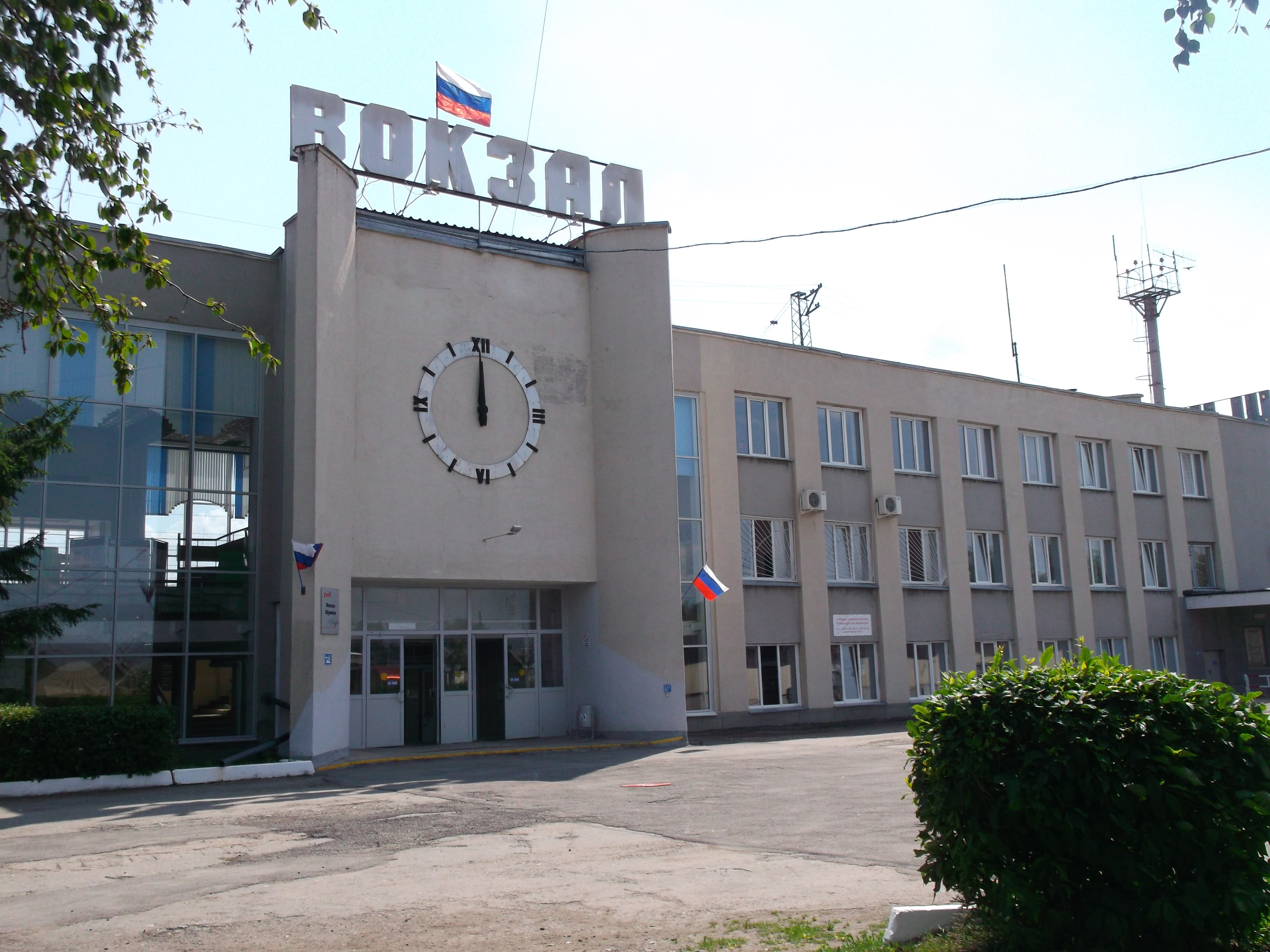 г. Шумиха